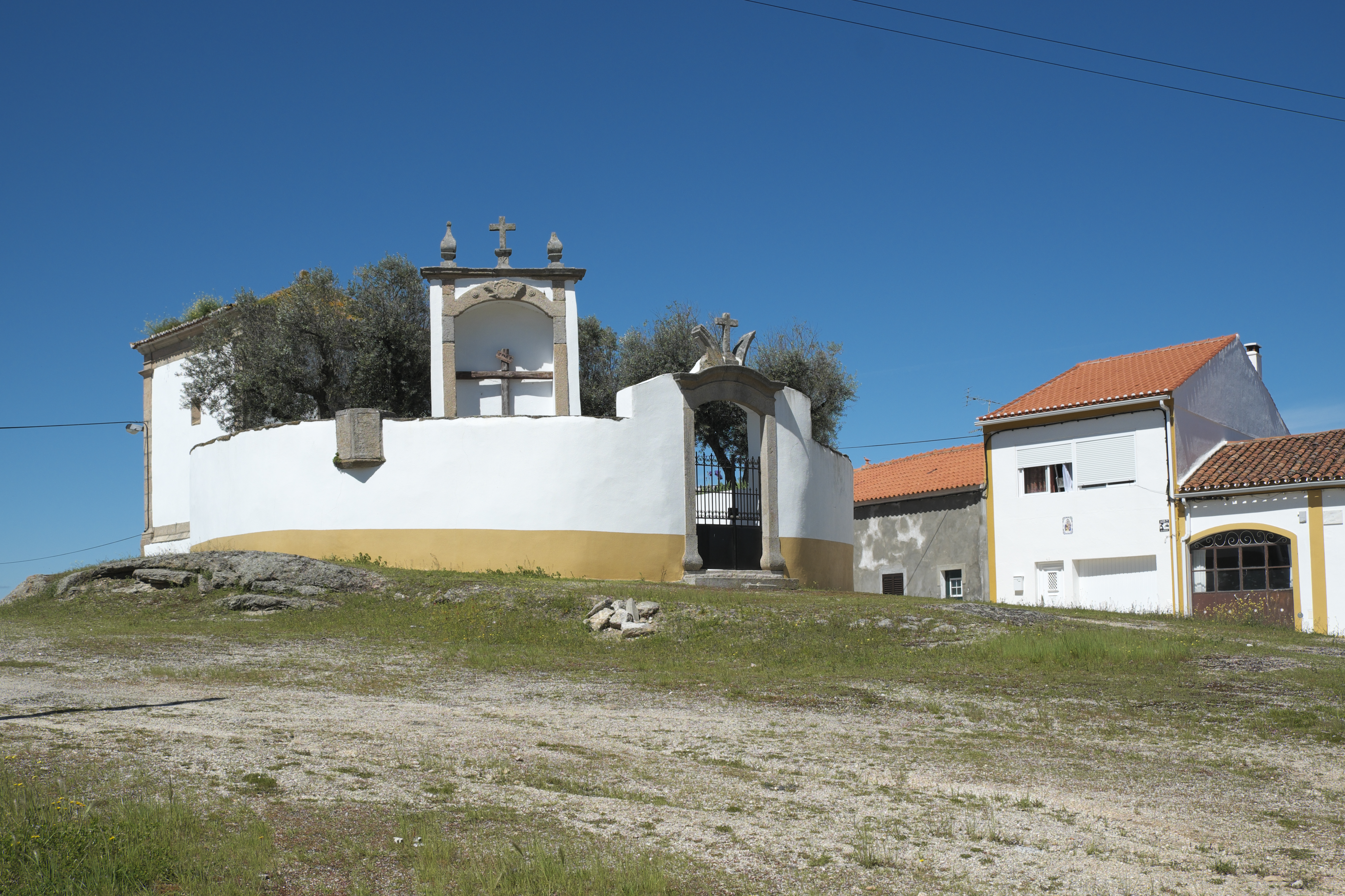 Capela do Calvário (Kreuzbergkapelle) neben dem Steinkreuz Cruzeiro de Alpalhão in Alpalhão im Kreis Nisa (Distrikt Portalegre/Portugal)